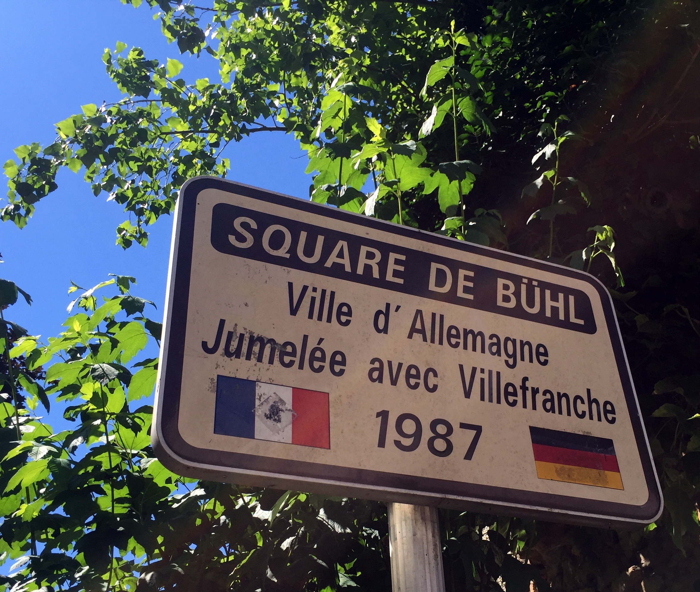 Panneau square de Bühl - Villefranche-sur-Saône.